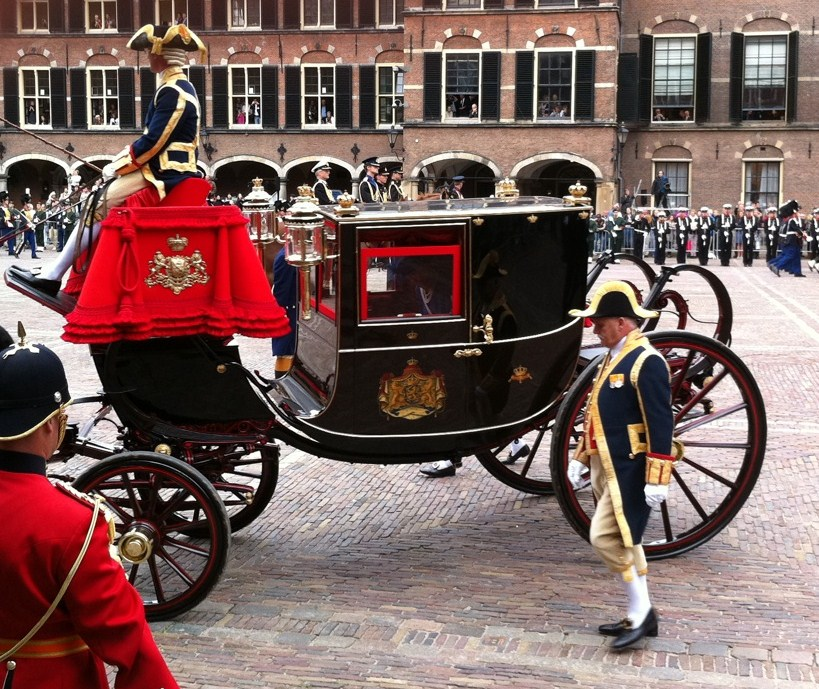 Gala berline coupé koets op het Binnenhof (Prinsjesdag)